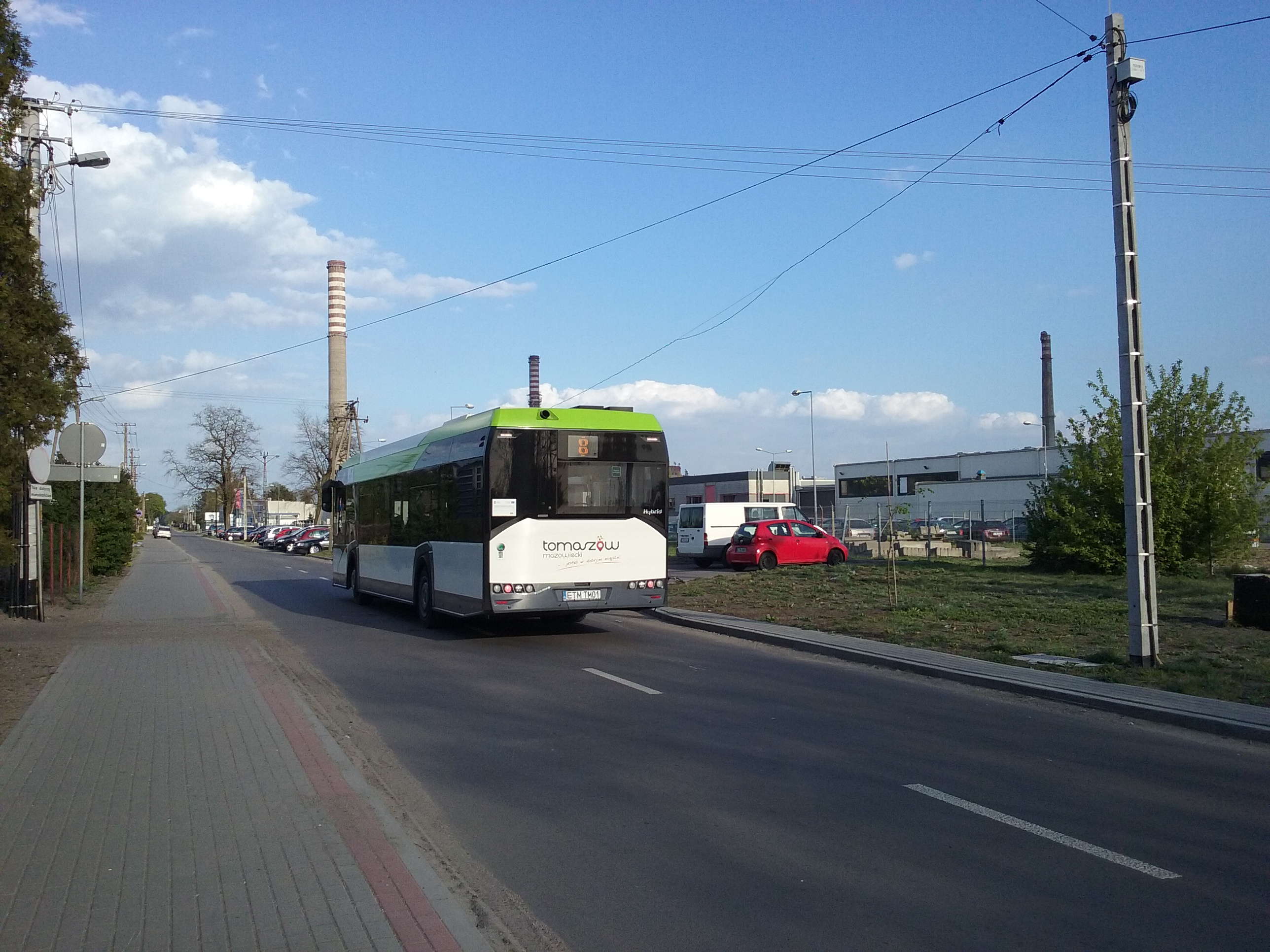 Tomaszów Mazowiecki w województwie łódzkim, PL, EU. Ulica Piaskowa w przemysłowej dzielnicy Kaczka. W tle zakłady Toyoty, na pierwszym planie autobus bezpłątnej komunikacji miejskiej. Na ulicy Piaskowej funkcjonują cztery przystanki MZK, CC0.